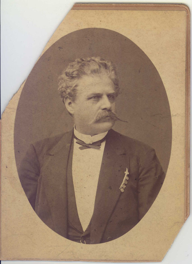 Fotografie von Albert Parlow (1824-1888)